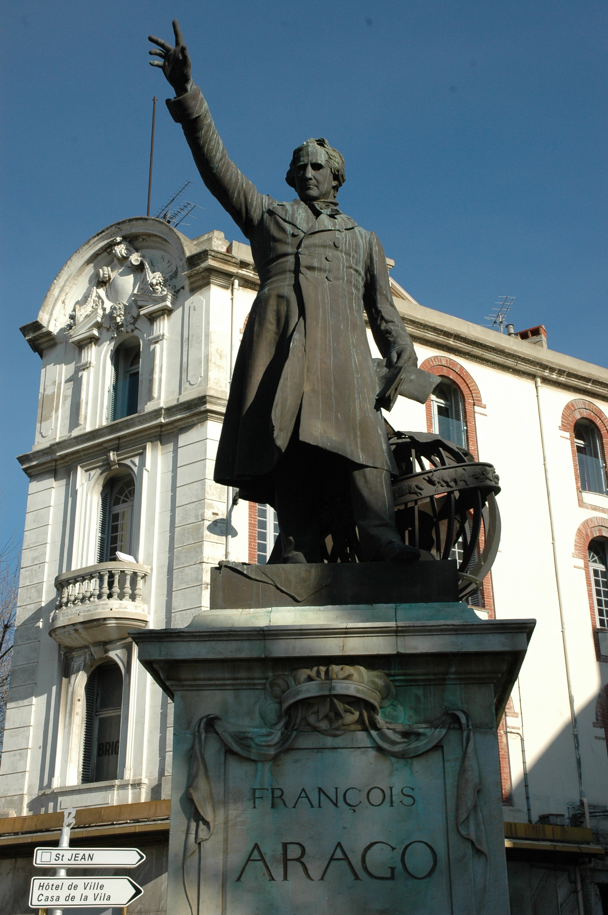 Antonin Mercié - François Arago a Perpinyà